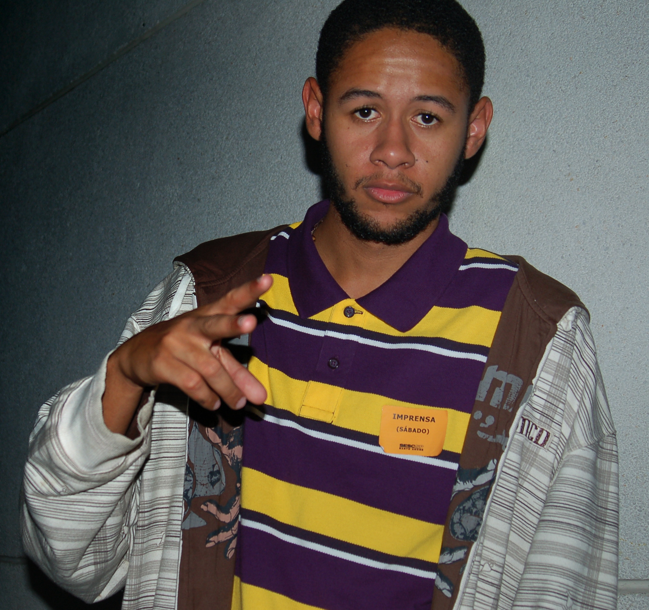 Indie Hip Hop '09 - 05.12